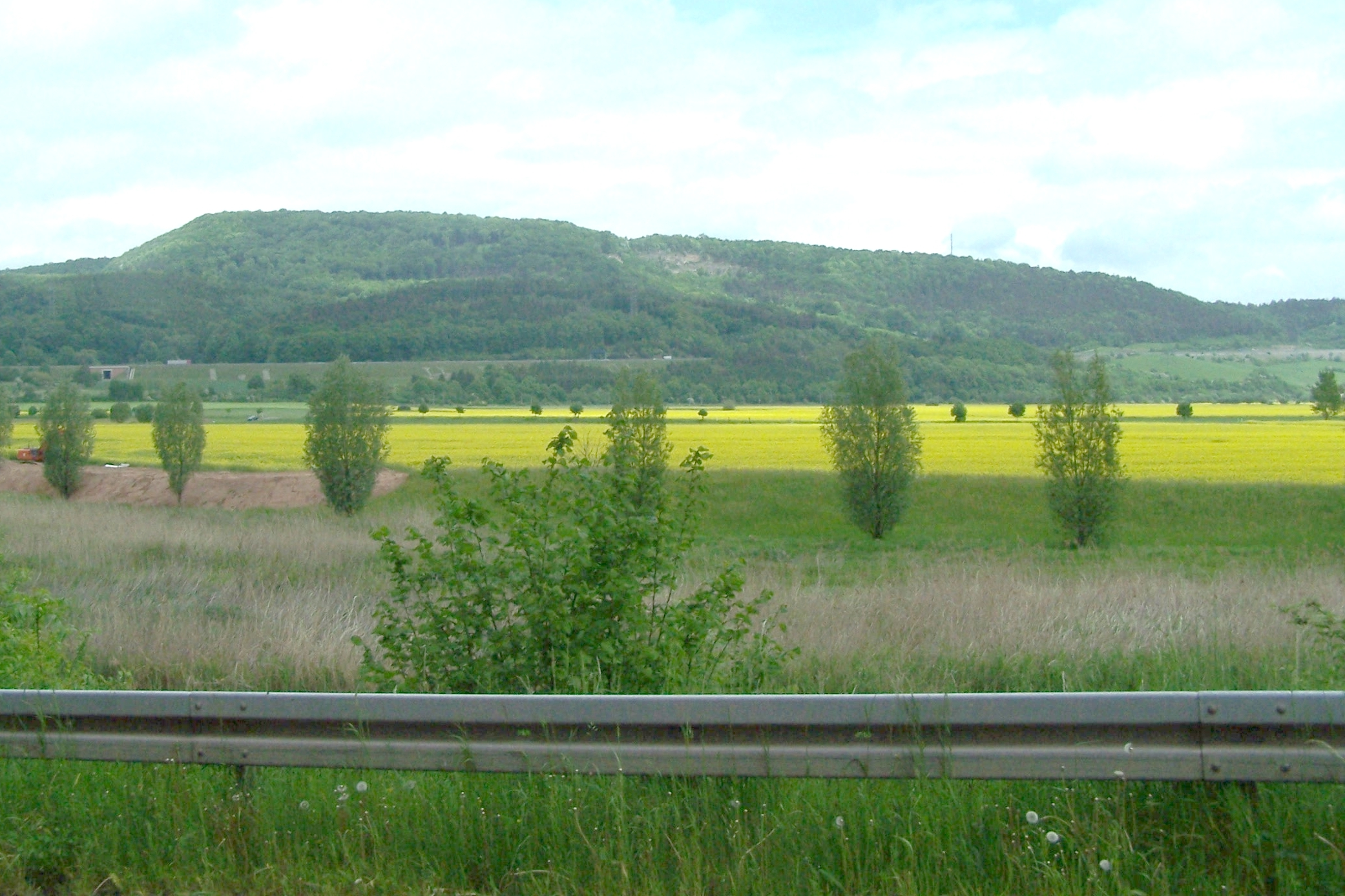 Der Kielforst - Ansicht von Wartha.